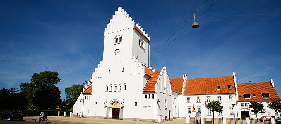 Filips Kirke on Amager in Copenhagen, Denmark